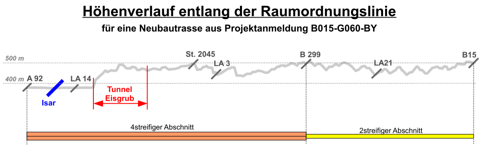 Höhenverlauf entlang der Raumordnungslinie der Ost-Süd-Umfahrung Landshut